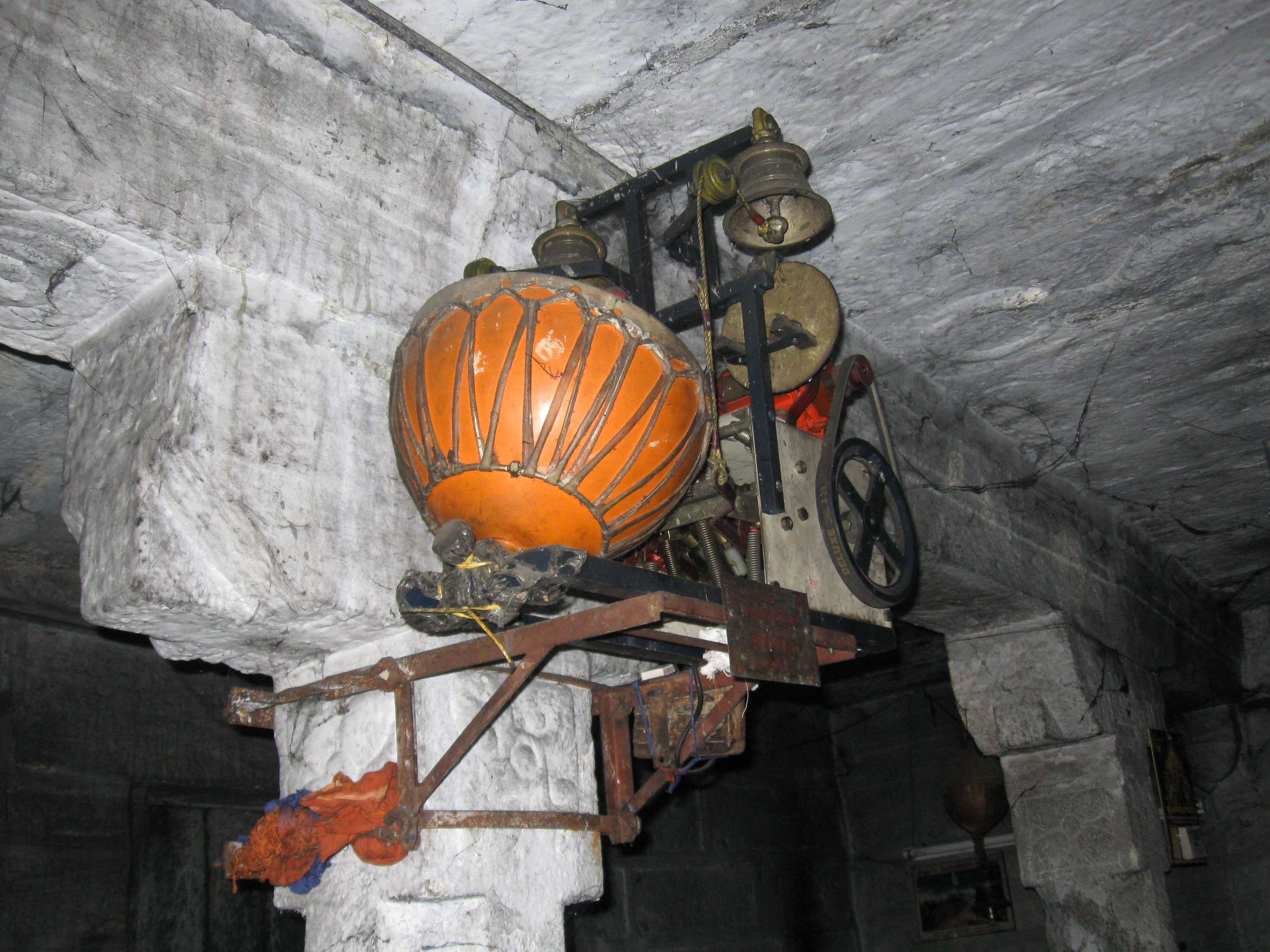 மின் மோளம் மற்றும் மணியடிக்கும் இயந்திரம்